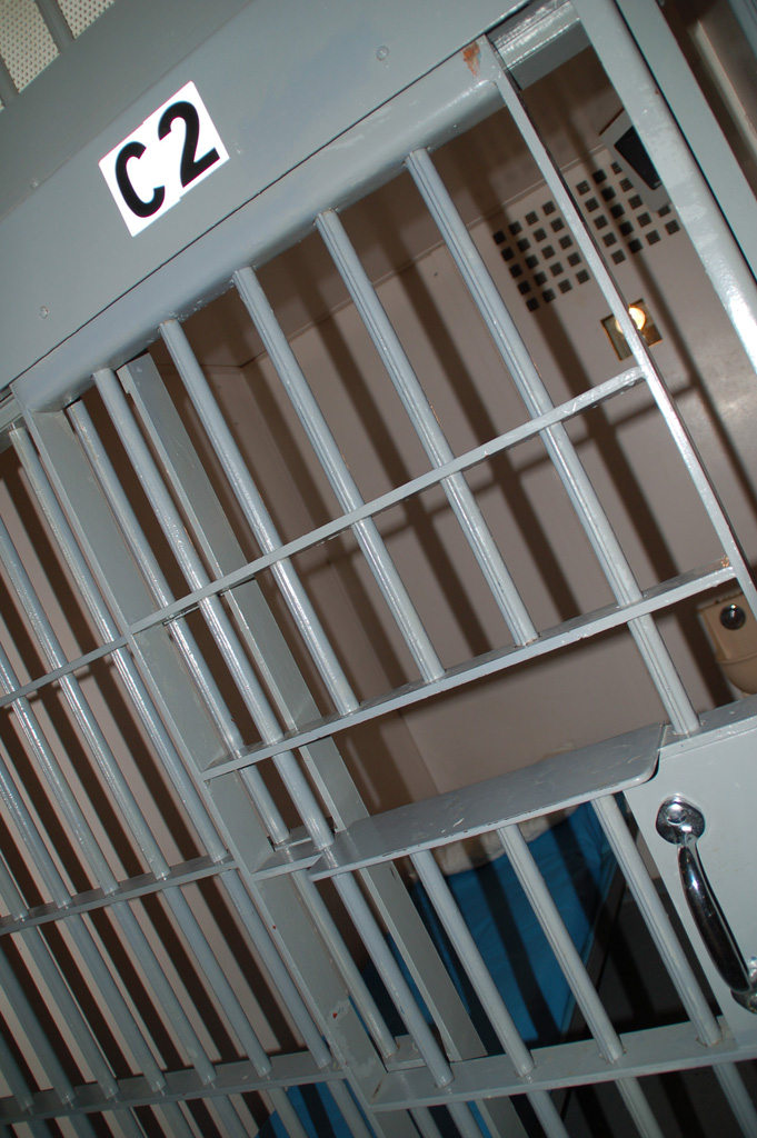 Uma cela moderna em Brecksville Police Department, Brecksville, Ohio